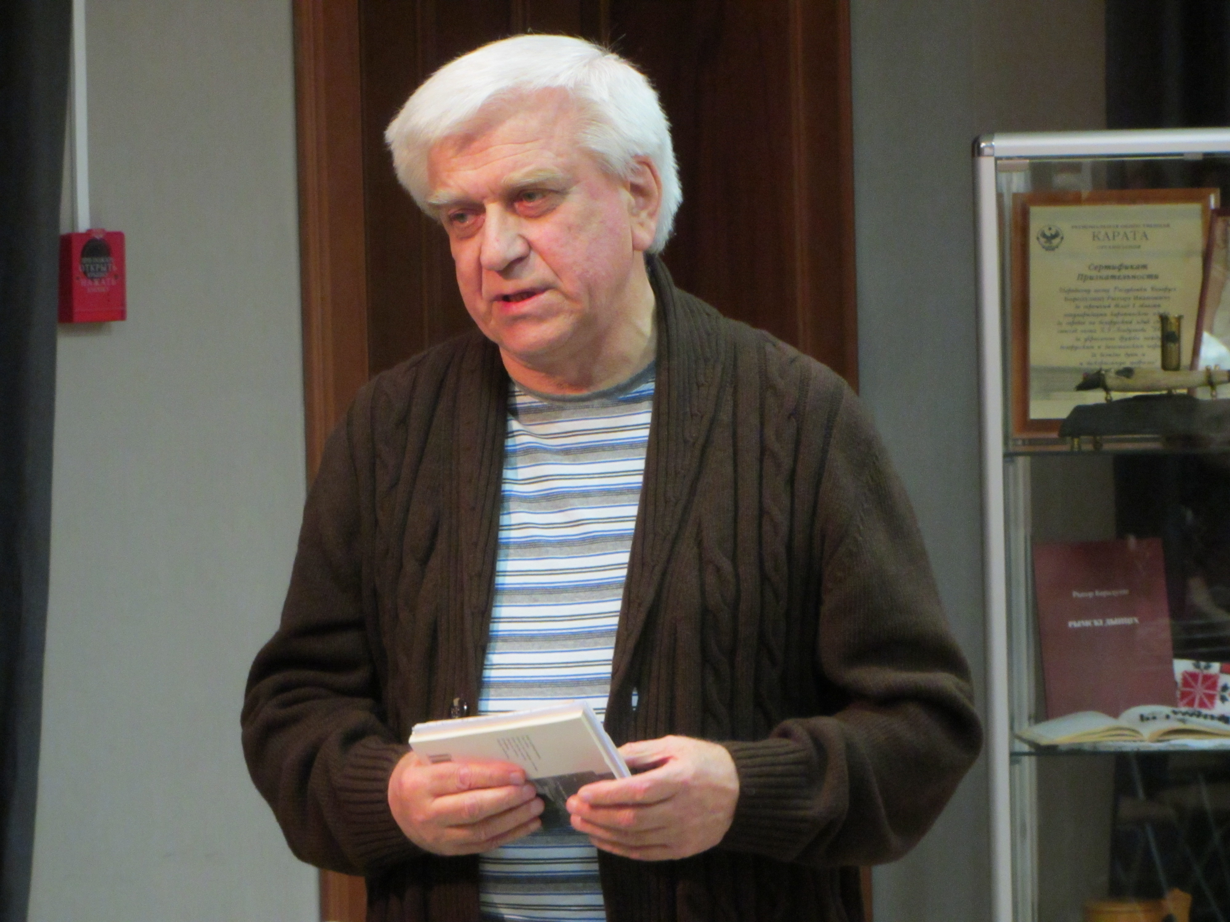 Беларуская (тарашкевіца): Сяргей Законьнікаў на адкрыцьці выстаўкі, прысьвечанай 80-годзьдзю Рыгора Барадуліна. 24.02.2015